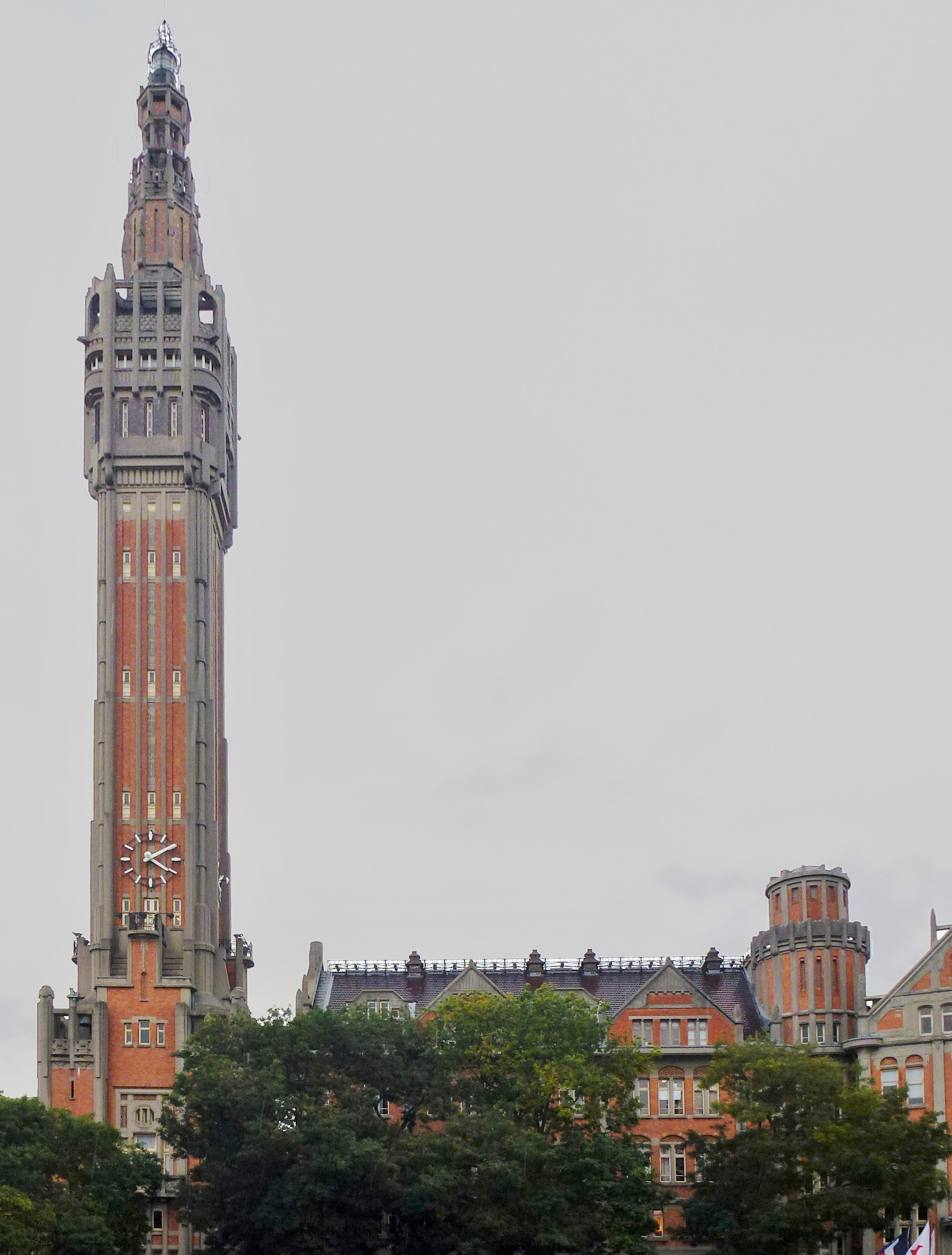 Beffroi de Lille Nord (département français) et l' Hôtel de Ville Beffrois du Nord-Pas-de-Calais,France .